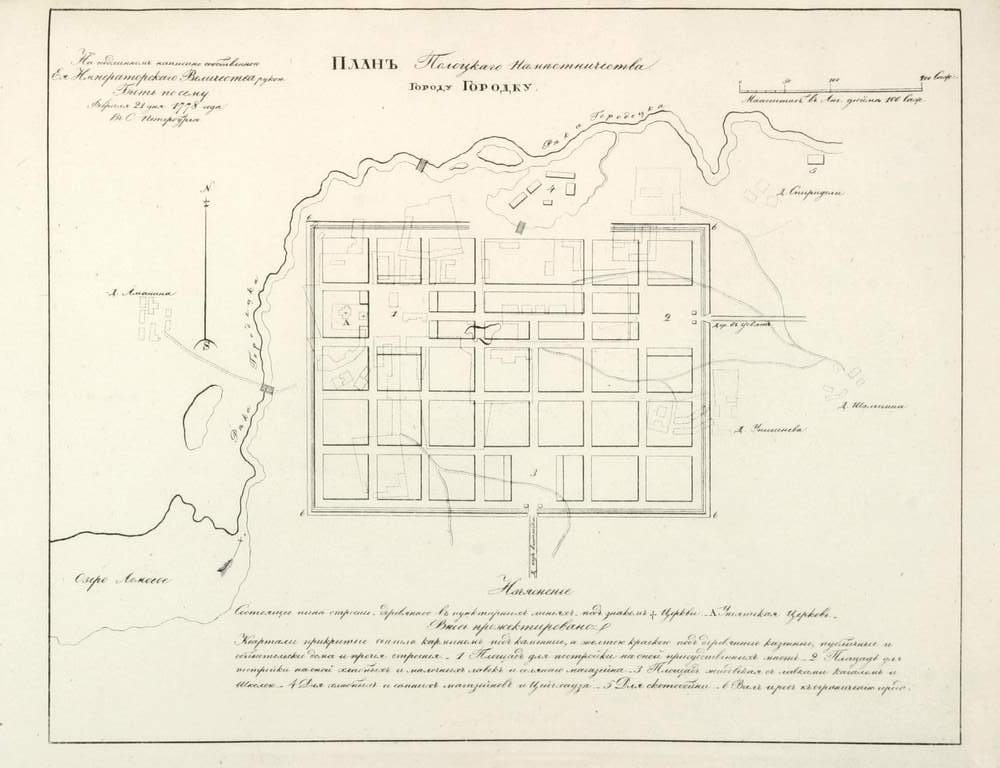 Беларуская (тарашкевіца): Гарадок (Haradok). Плян места, праект